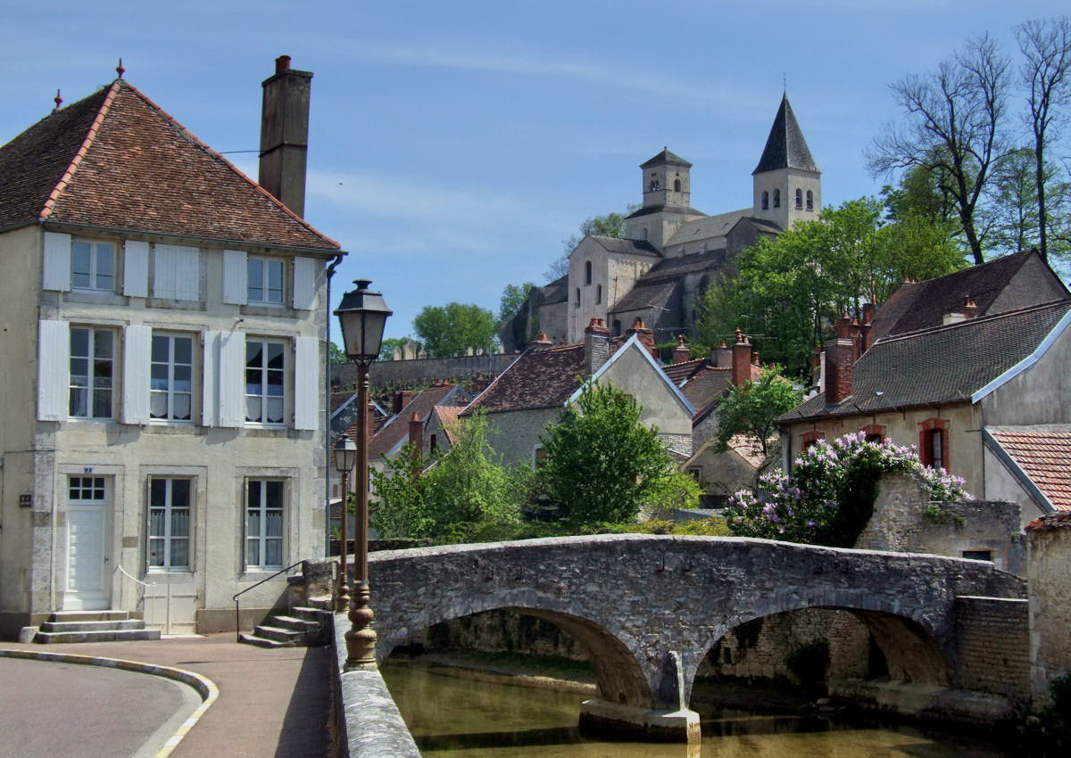 Châtillon-sur-Seine, France